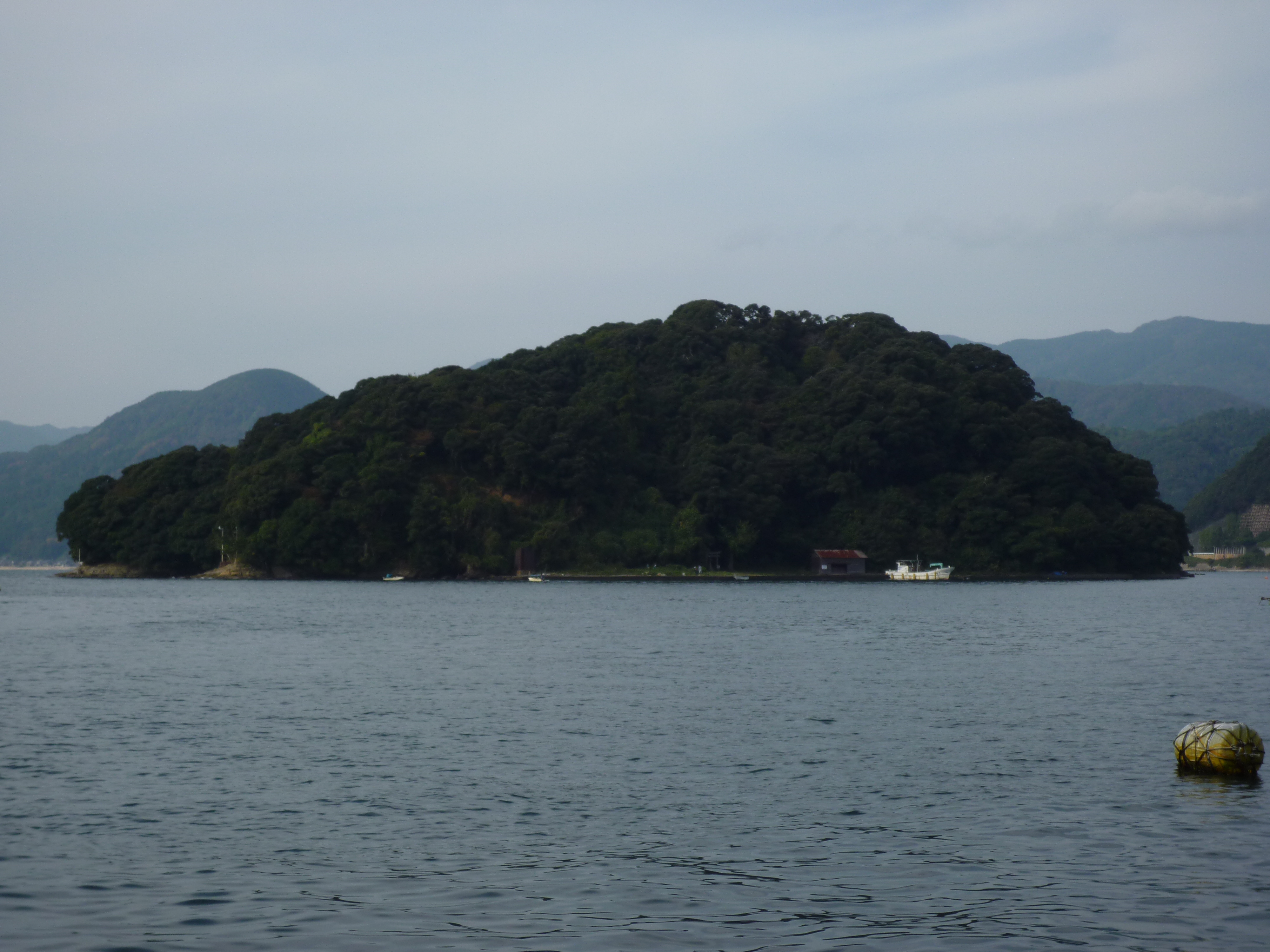 青島（京都府与謝郡伊根町）2009年10月